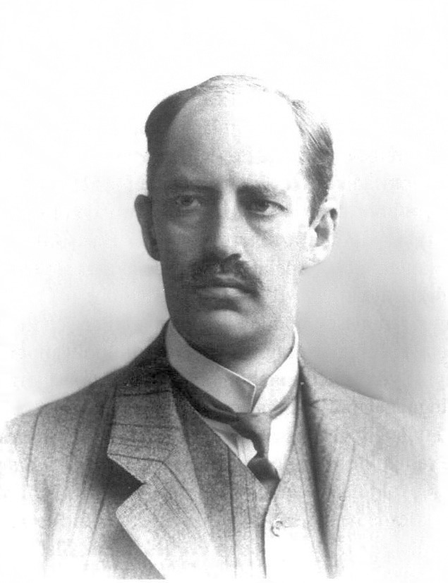 Birger Wedberg (1870-1945), justitieråd 1913-1939. Ledamot av Svenska akademien 1931-1945.